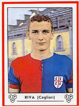 Gigi Riva che indossa la maglia del Cagliari